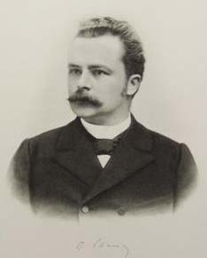 Emiel Lauwers (1828-1921) - chirurg - Kortrijk - West-Vlaanderen - België